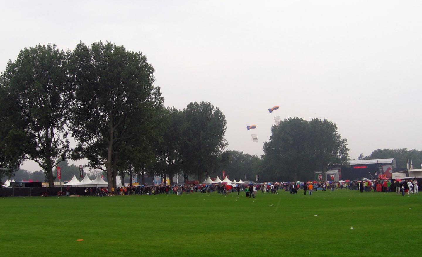 Zuiderpark tijdens Parkpop 2006